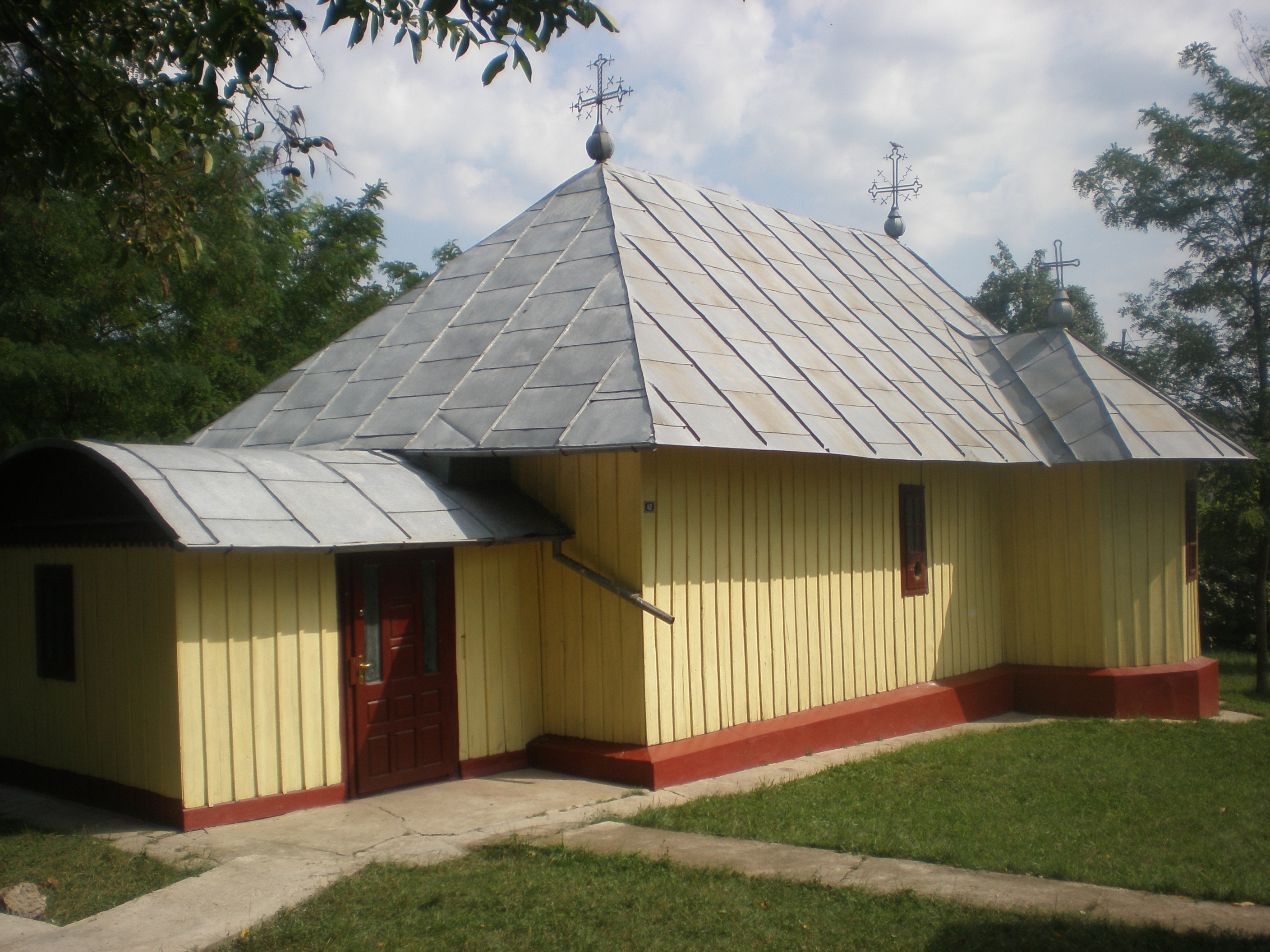 Biserica de lemn din localitatea "Aurel Vlaicu", Botoşani